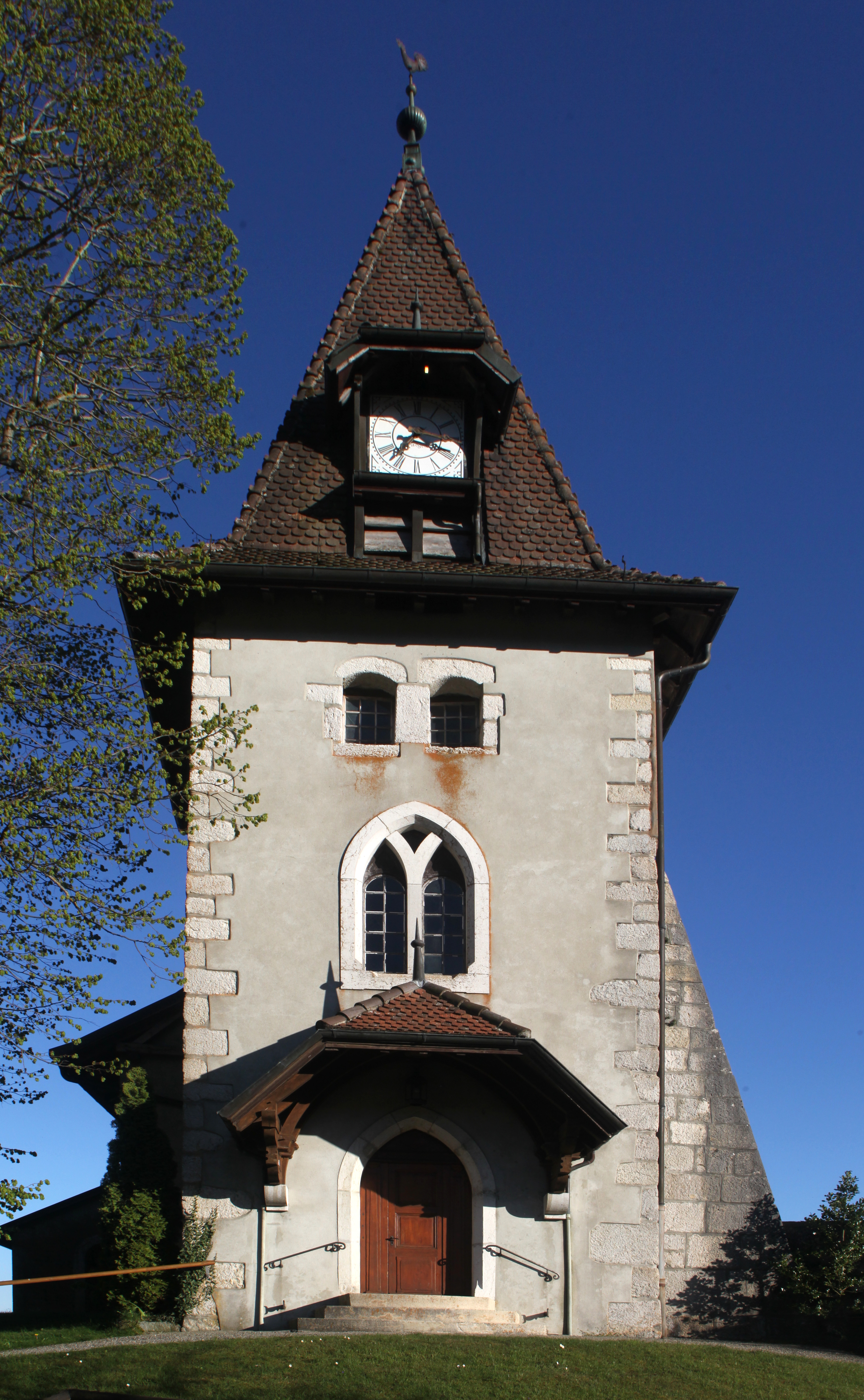 Église de Marchissy (Vaud).